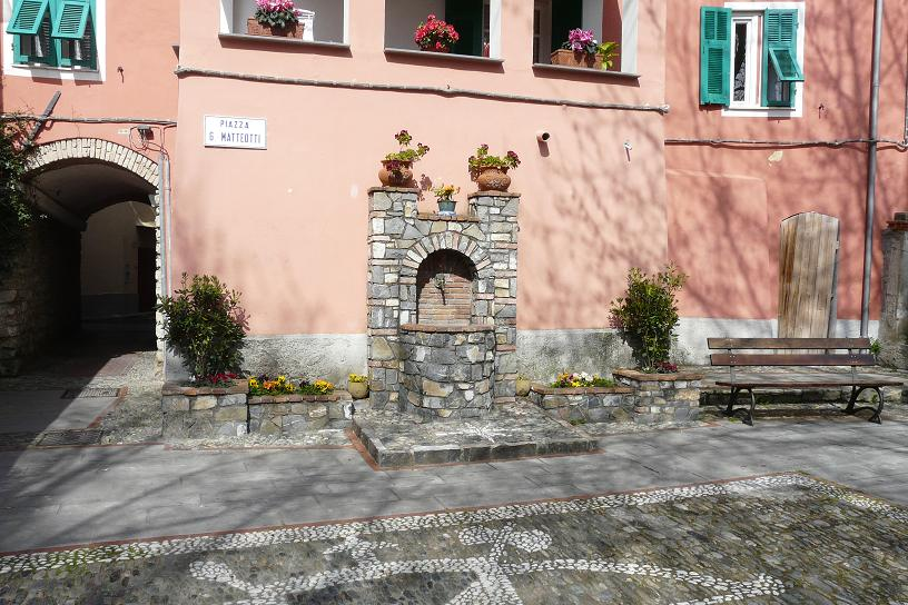 Castellaro, Liguria, Italia